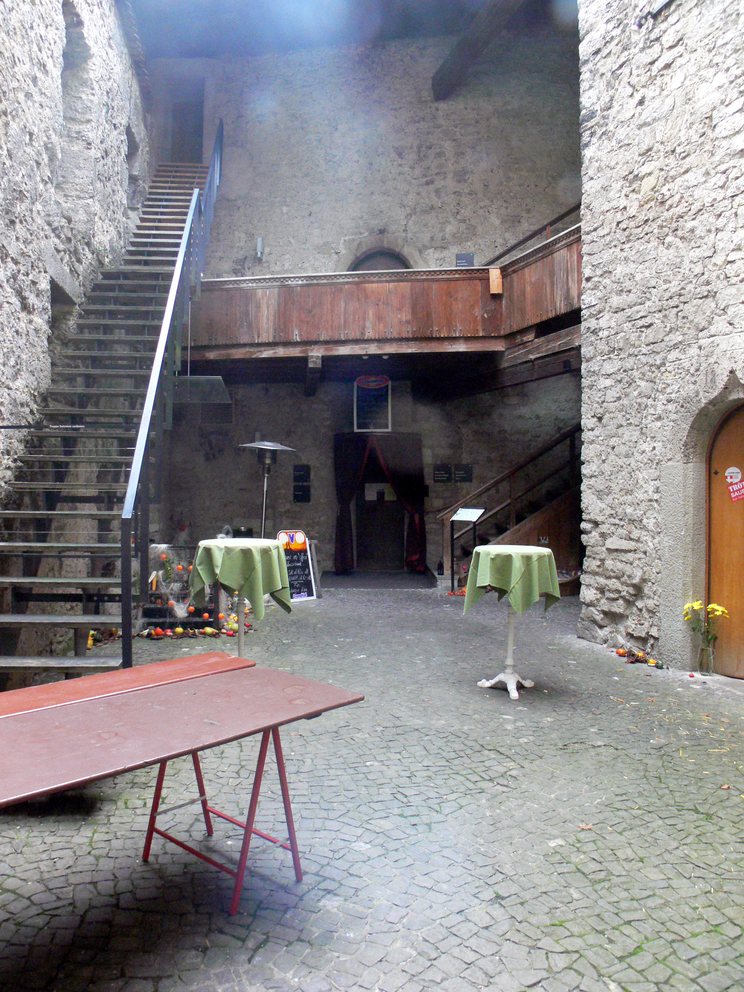 Habsburg